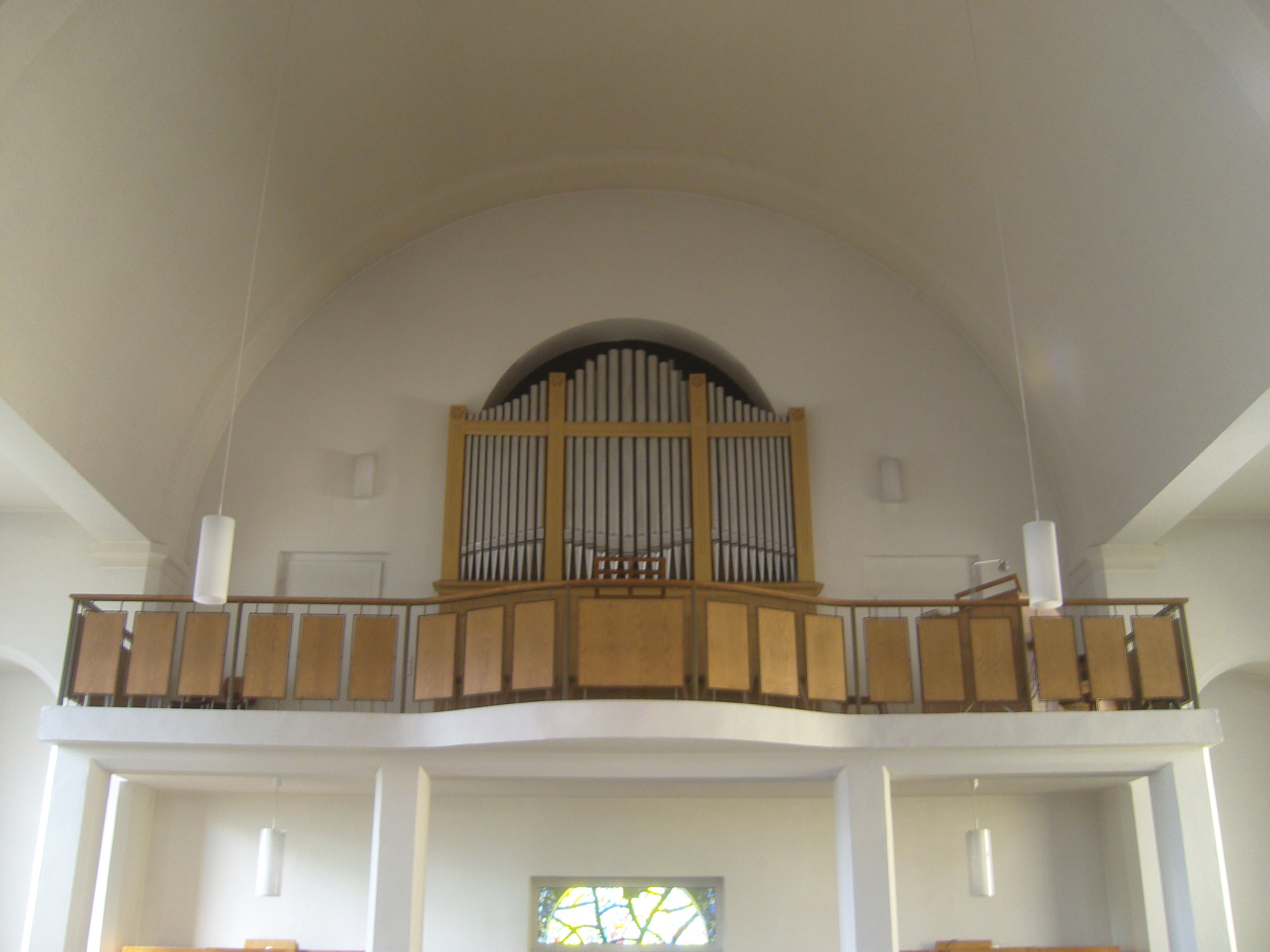 Orgel in der St.-Peter-und-Paul-Kirche in Senftenberg